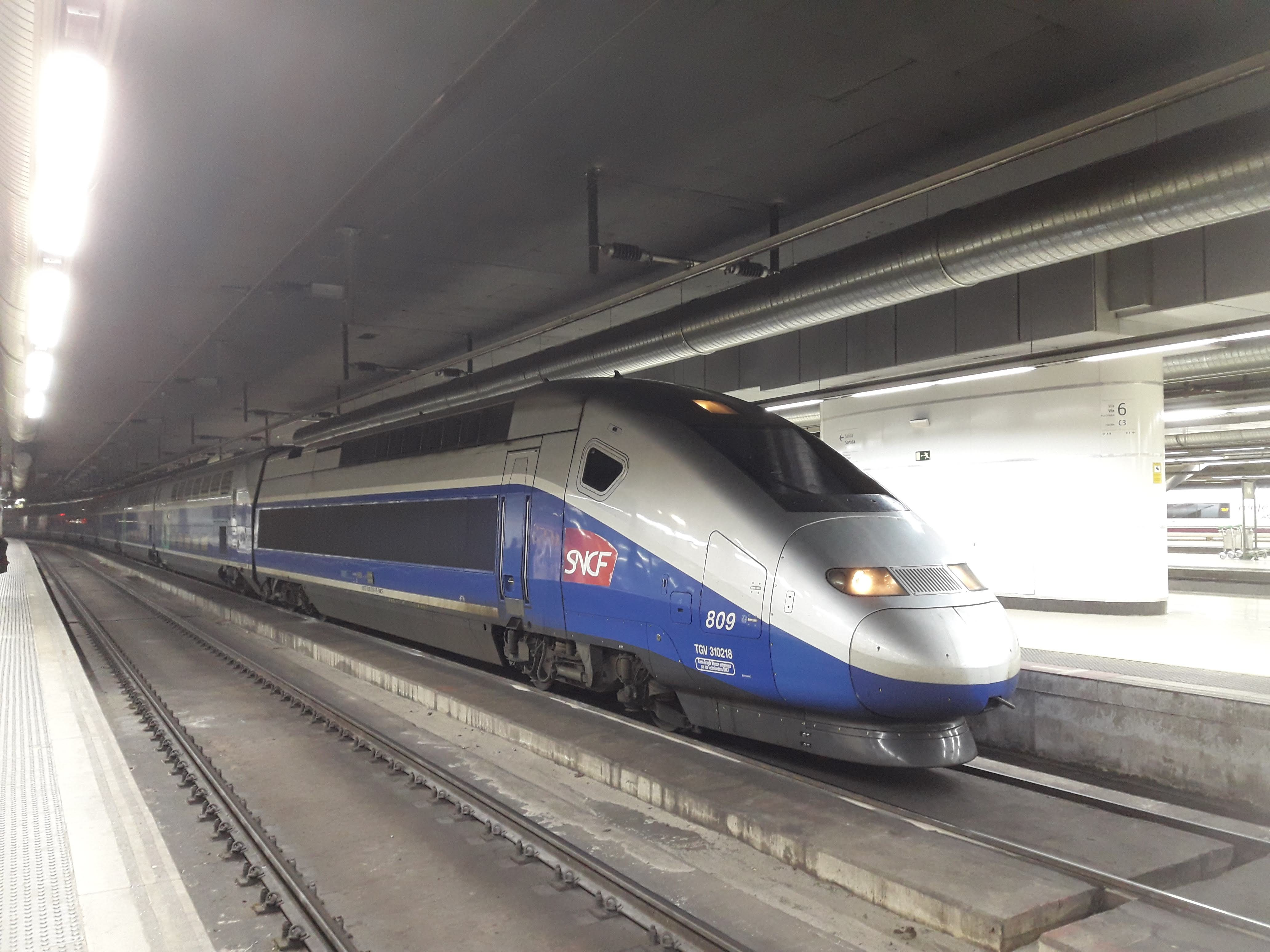 TGV a l'estació de Sants.